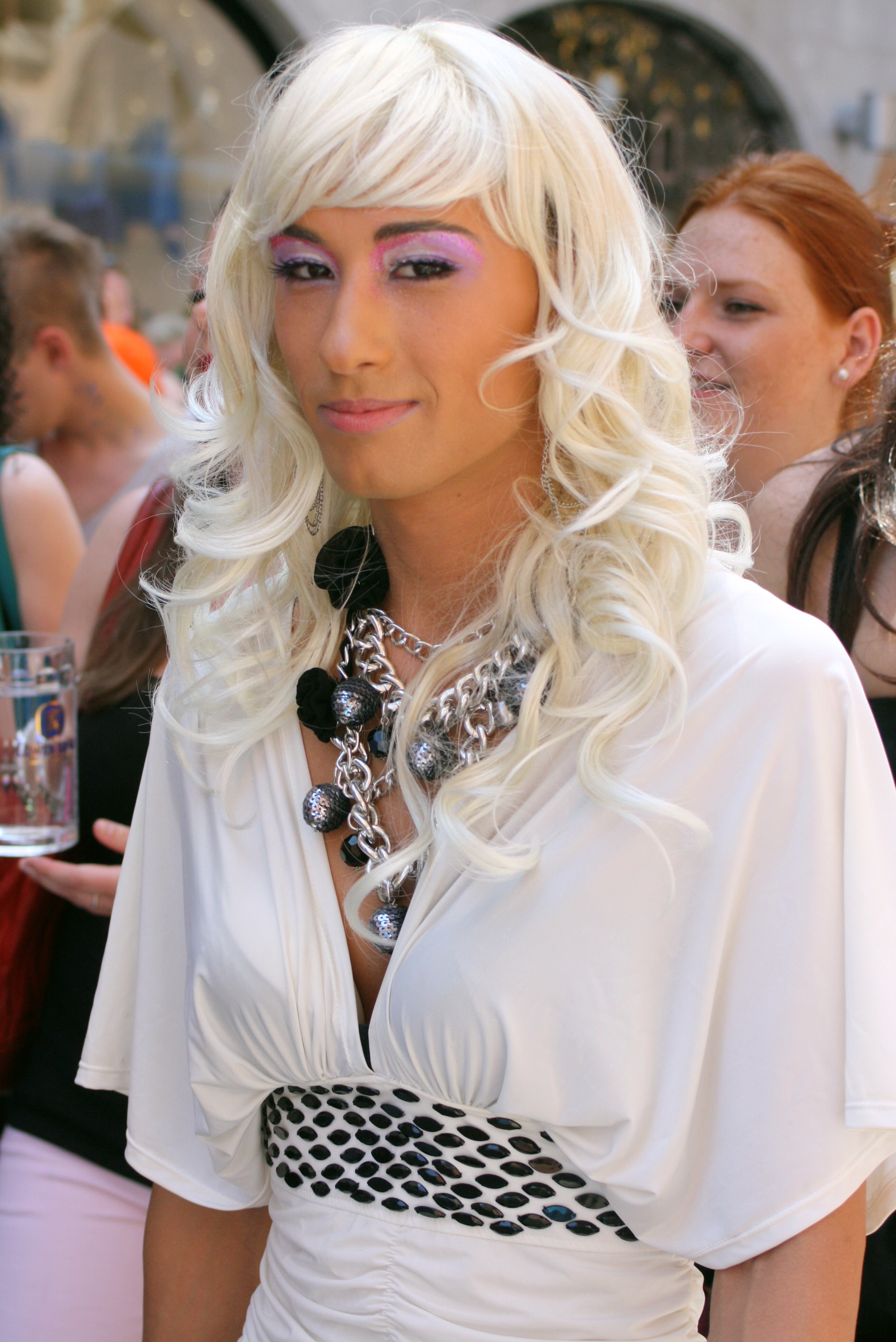 CSD 2011 in München